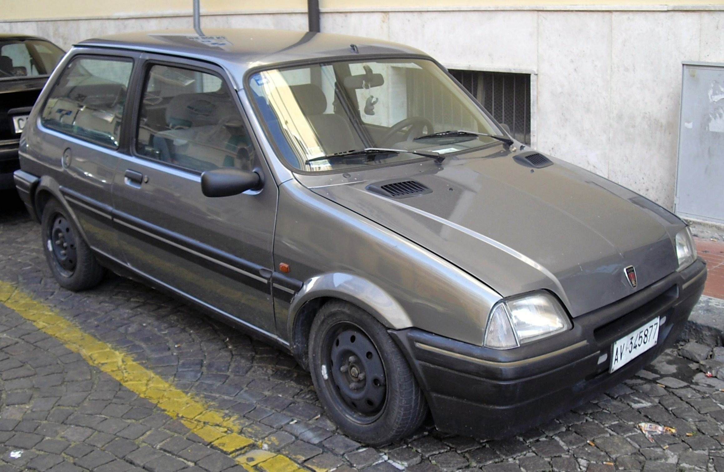 Rover Serie 100 (111 tre porte)